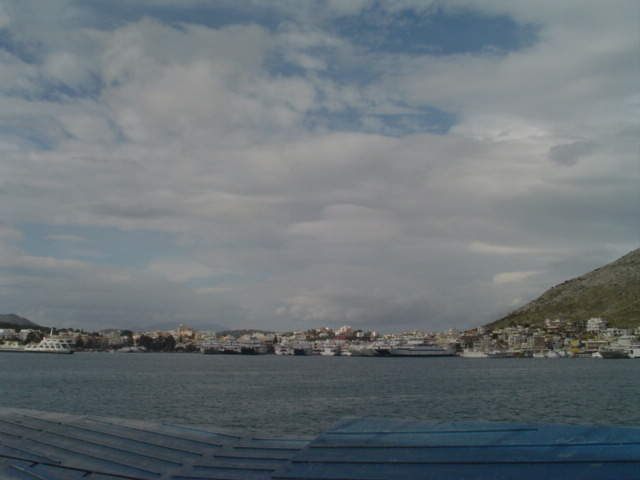 Paloukia port in Salamis Island - Il porto di Paloukia nell'isola di Salamina